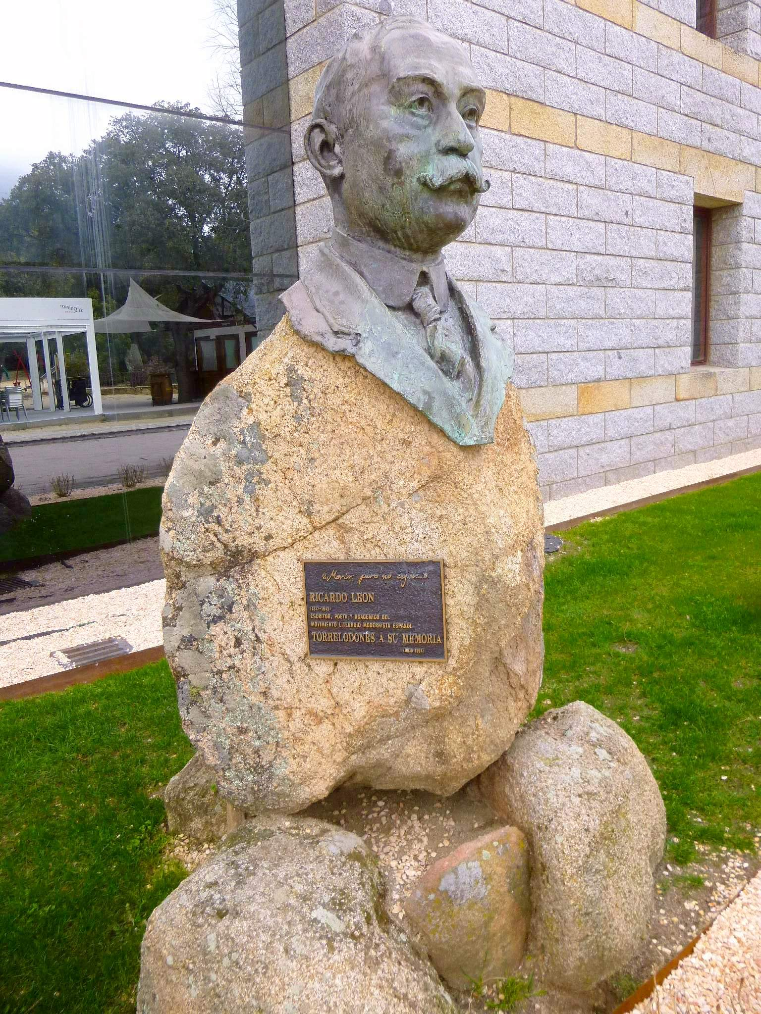 Monumento a Ricardo León (Torrelodones, Comunidad de Madrid)